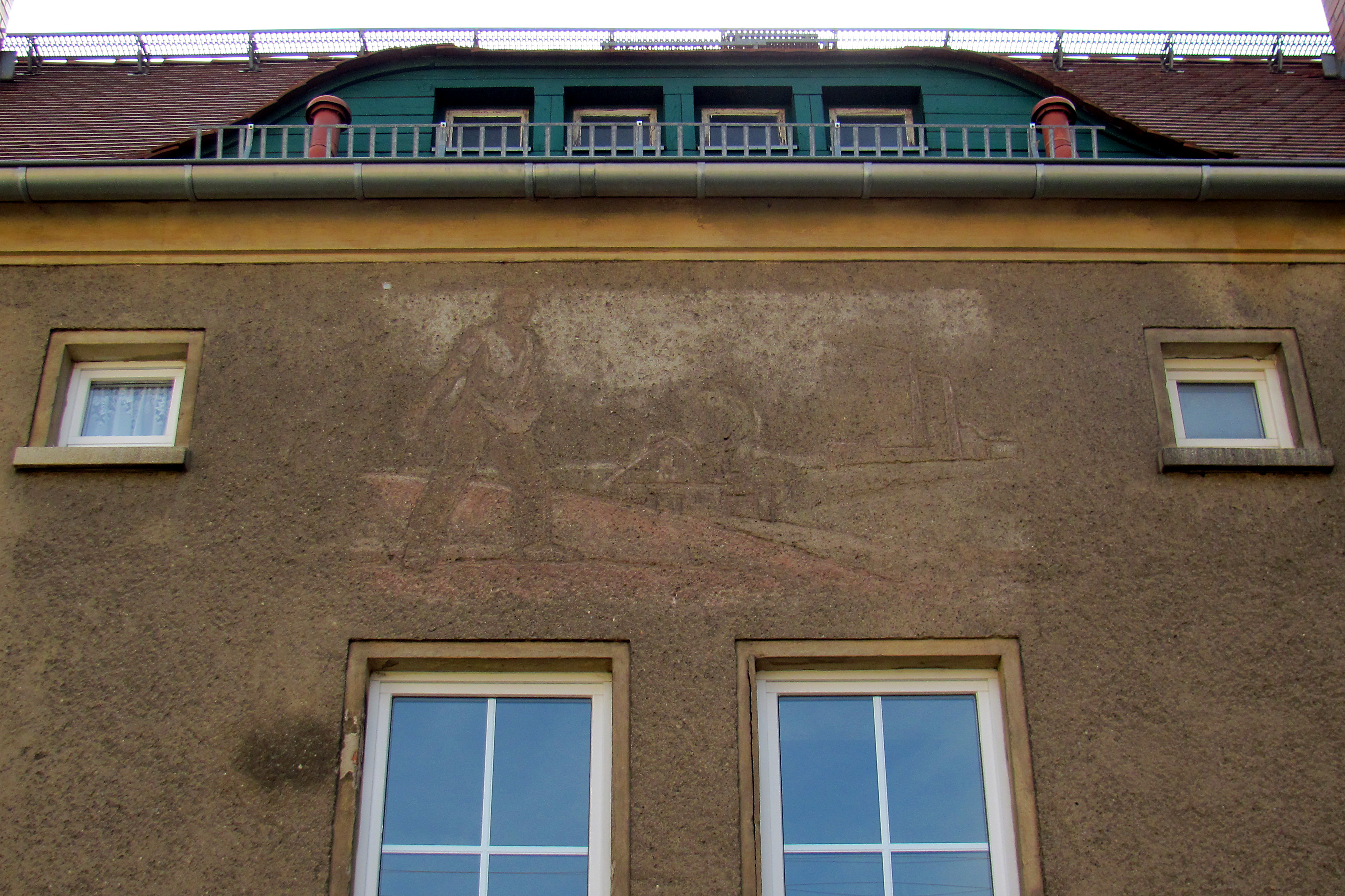 Radebeul-Naundorf, Siedlung der Landessiedlungsgesellschaft Sachsen, verblasstes Sgraffito an Weistropper Straße 2